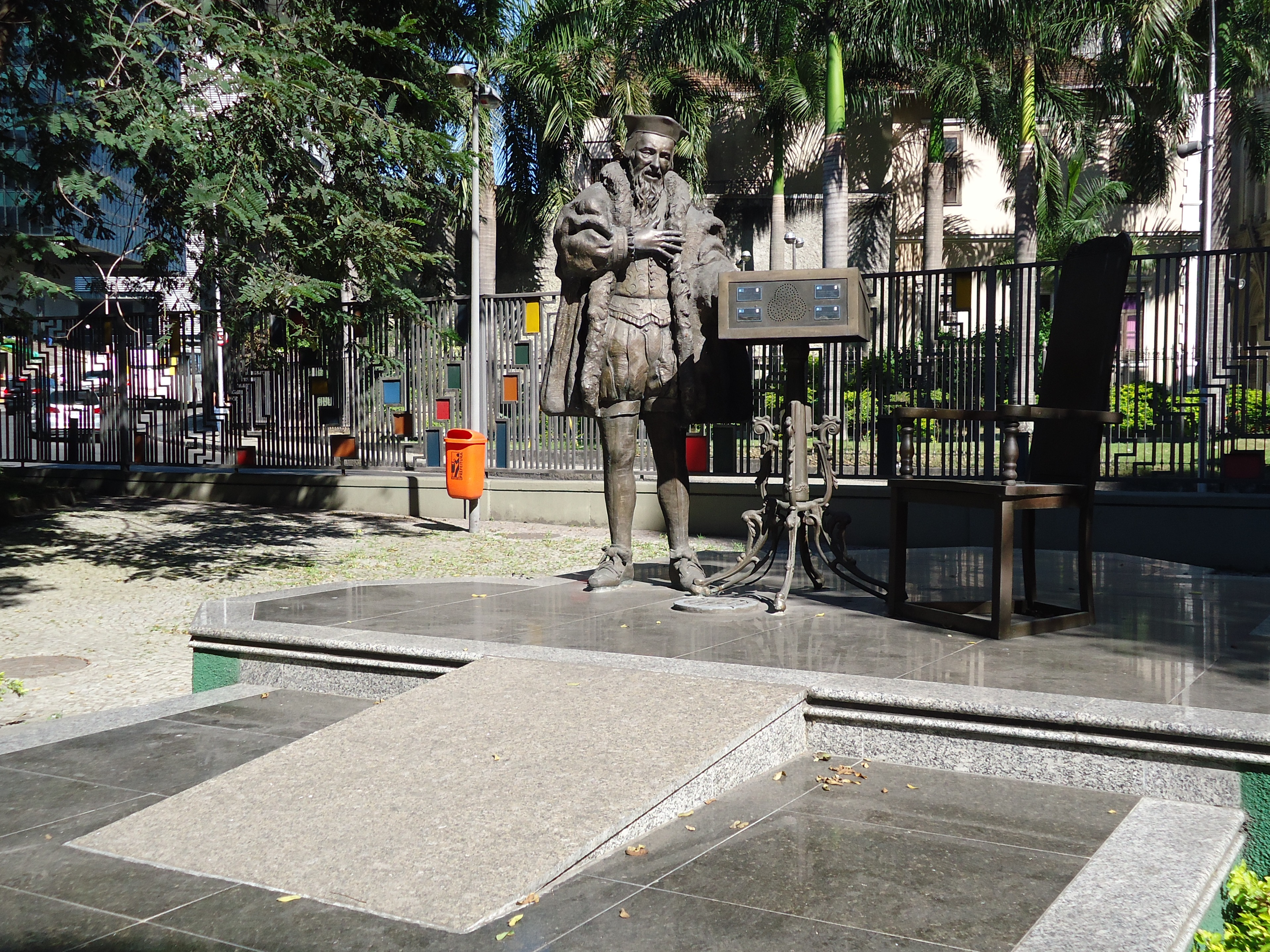 Conjunto escultórico representando João Calvino, Praça João Calvino, Rio de Janeiro, RJ, Brasil. Escultor: Joás Pereira Passos, 2009.